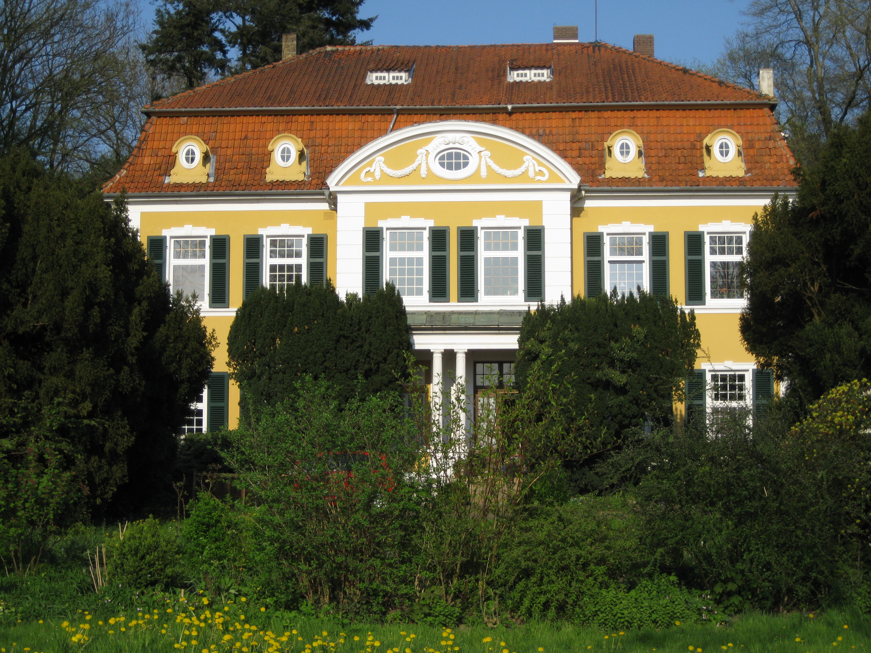 Gutshaus der Familie Vinnen in 27616 Beverstedt-Osterndorf, Landkreis Cuxhaven, Niedersachsen, Deutschland. Wohnung und Atelier des Kunstmalers Carl Vinnen (1863 - 1922). 53°26'30.55"N 8°50'1.01"O